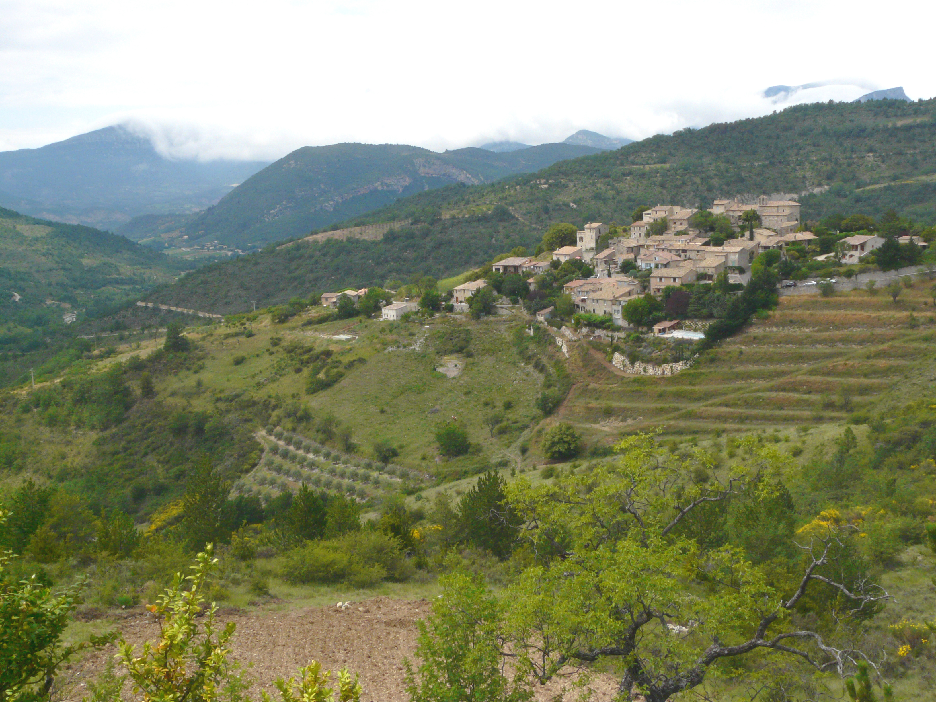 Le village d'Arpavon en Drôme provençale